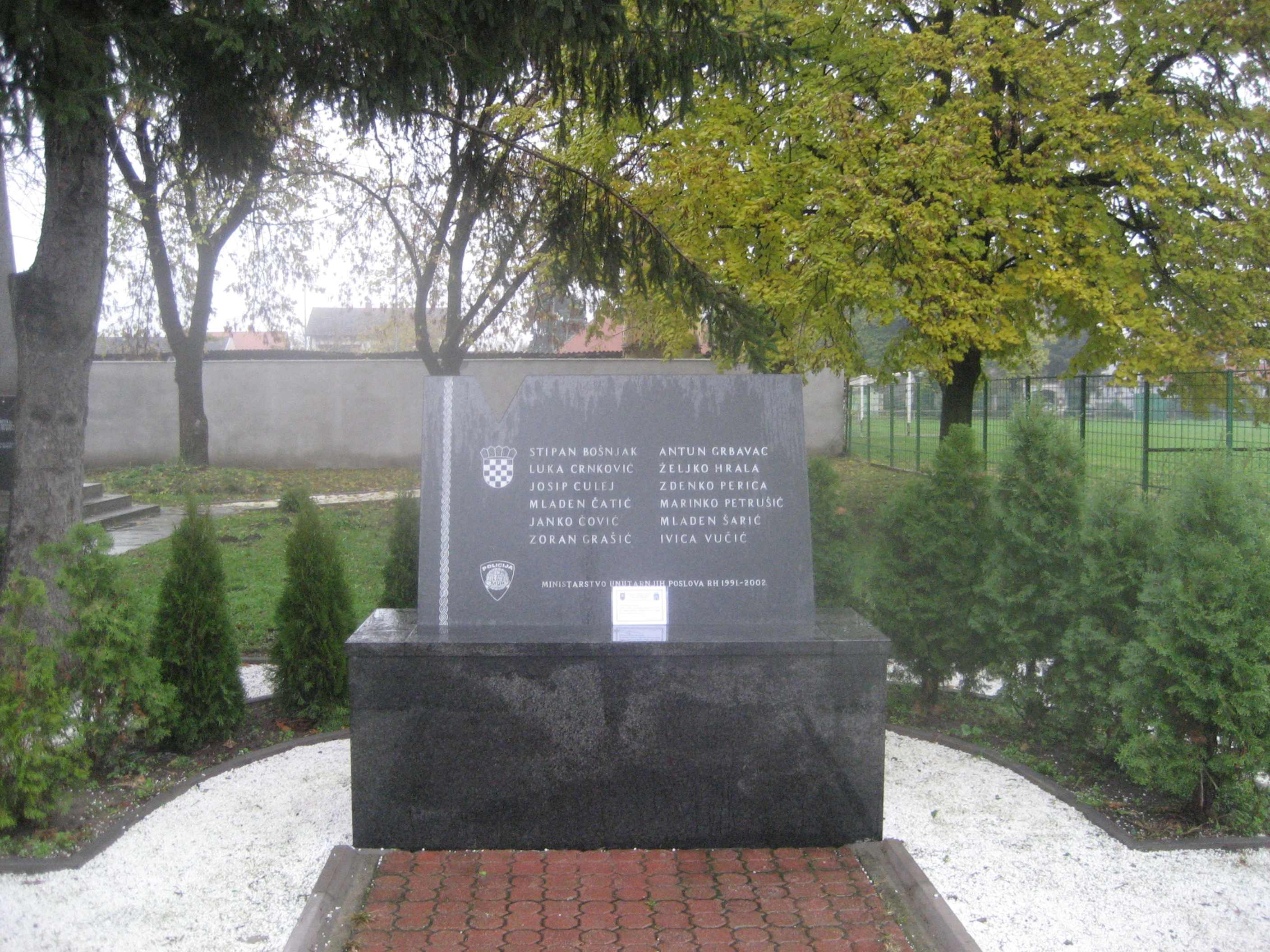 Borovo Selo massacre Memorial